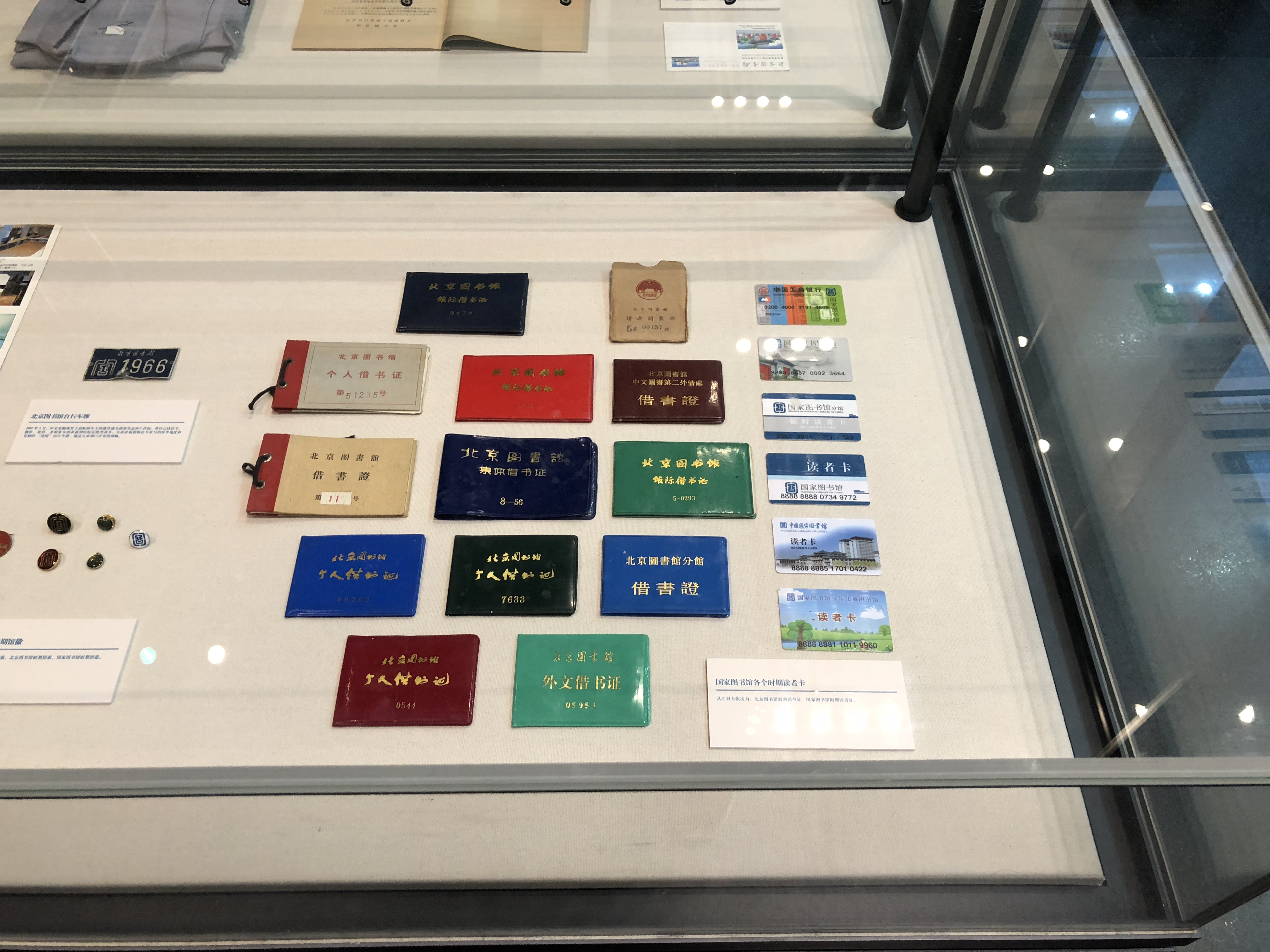 中文（中国大陆）: 国家图书馆各种借书证。新馆成立三十周年纪念展览